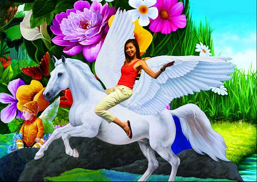 Музей оптических иллюзий Trick Eye в Пусане